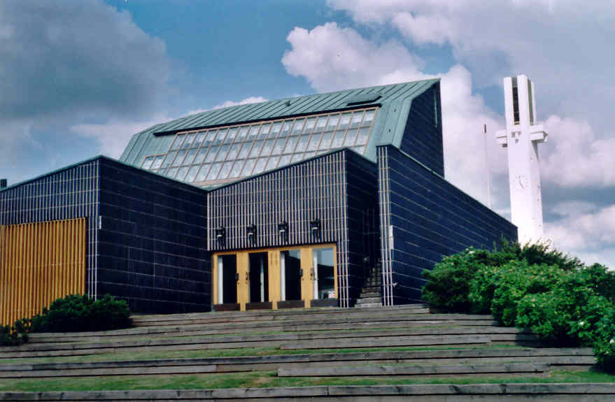 Alvar Aalto-centrum i Östermyra, Finland.